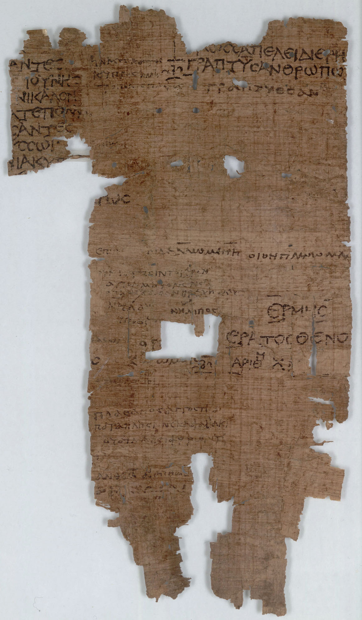 Papyrus-Fragment P.Oxy. XLII 3000 des Gedichtes Hermes von Eratosthenes; Oxyrhynchos; 1. Jh. v.–1. Jh. n. Chr.; Sackler Library, Oxford